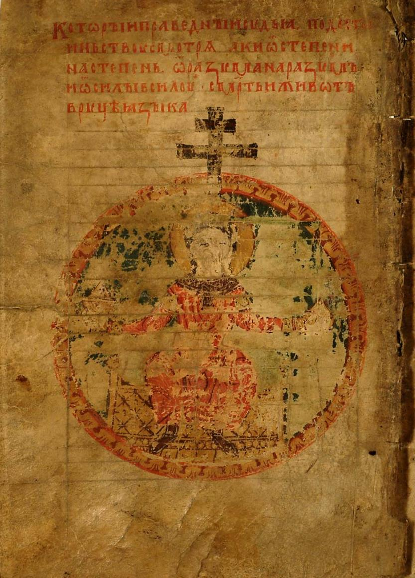 Рукопись № 15. (2026). Мерило праведное, устав. красивый, исх. ХІV века, в четверть, 348 л. Фонд 304.I. Главное собрание библиотеки Троице-Сергиевой лавры. Лист 1 оборот. Образ Спасителя.